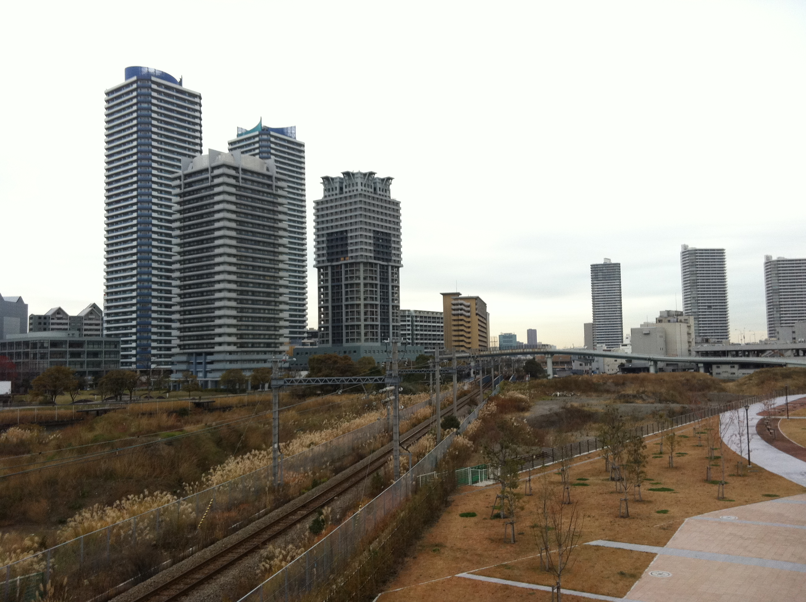 高島水際線公園よりポートサイド地区を望む。